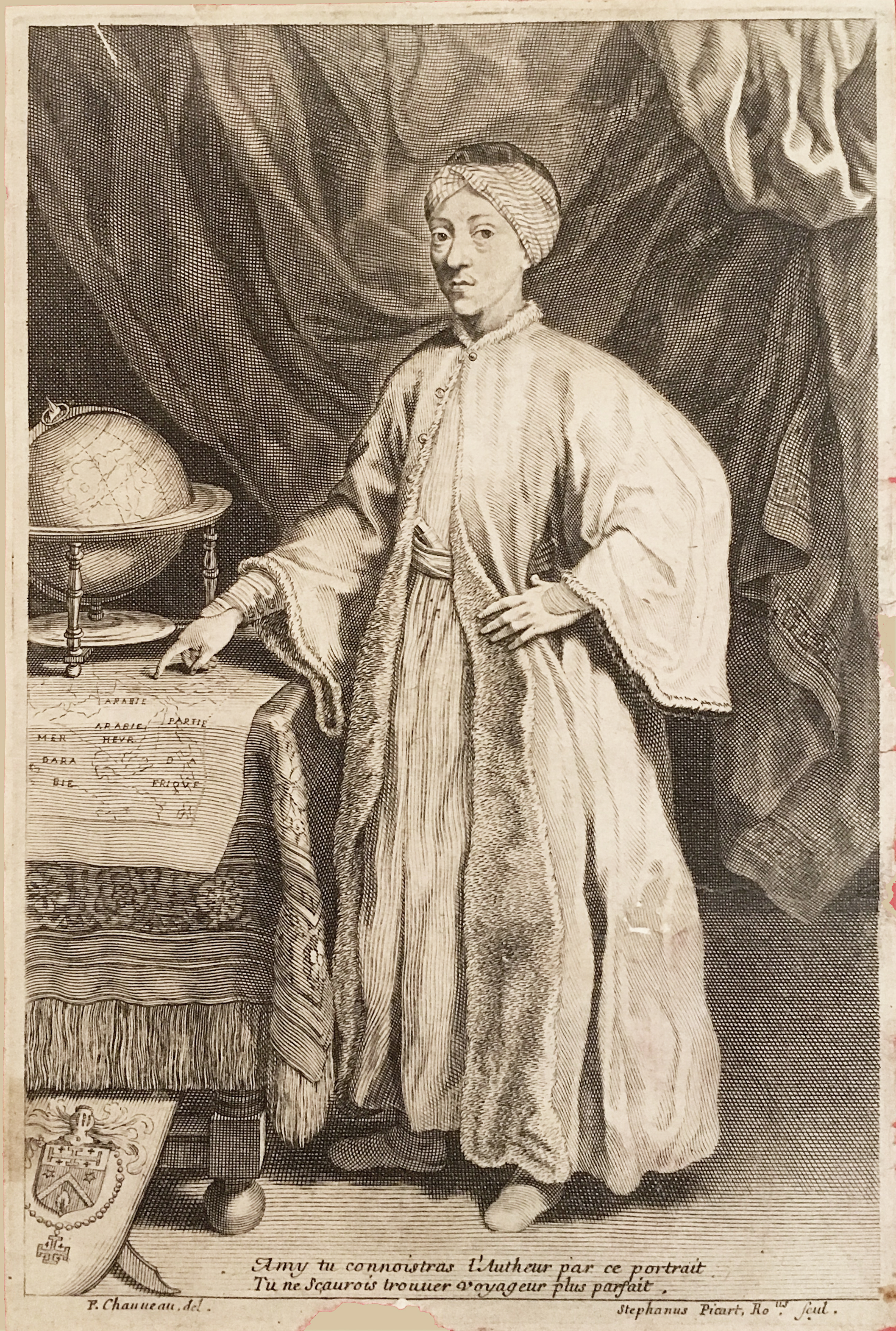 François Chauveau del. et Sephanus Picart sculp. Coll. part.